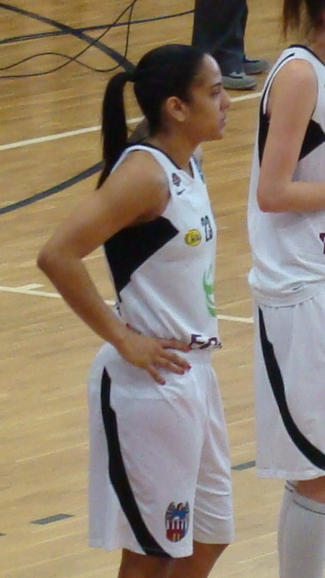 Portorykańska koszykarka Jazmine Sepulveda w barwach Katarzynek Energi Toruń